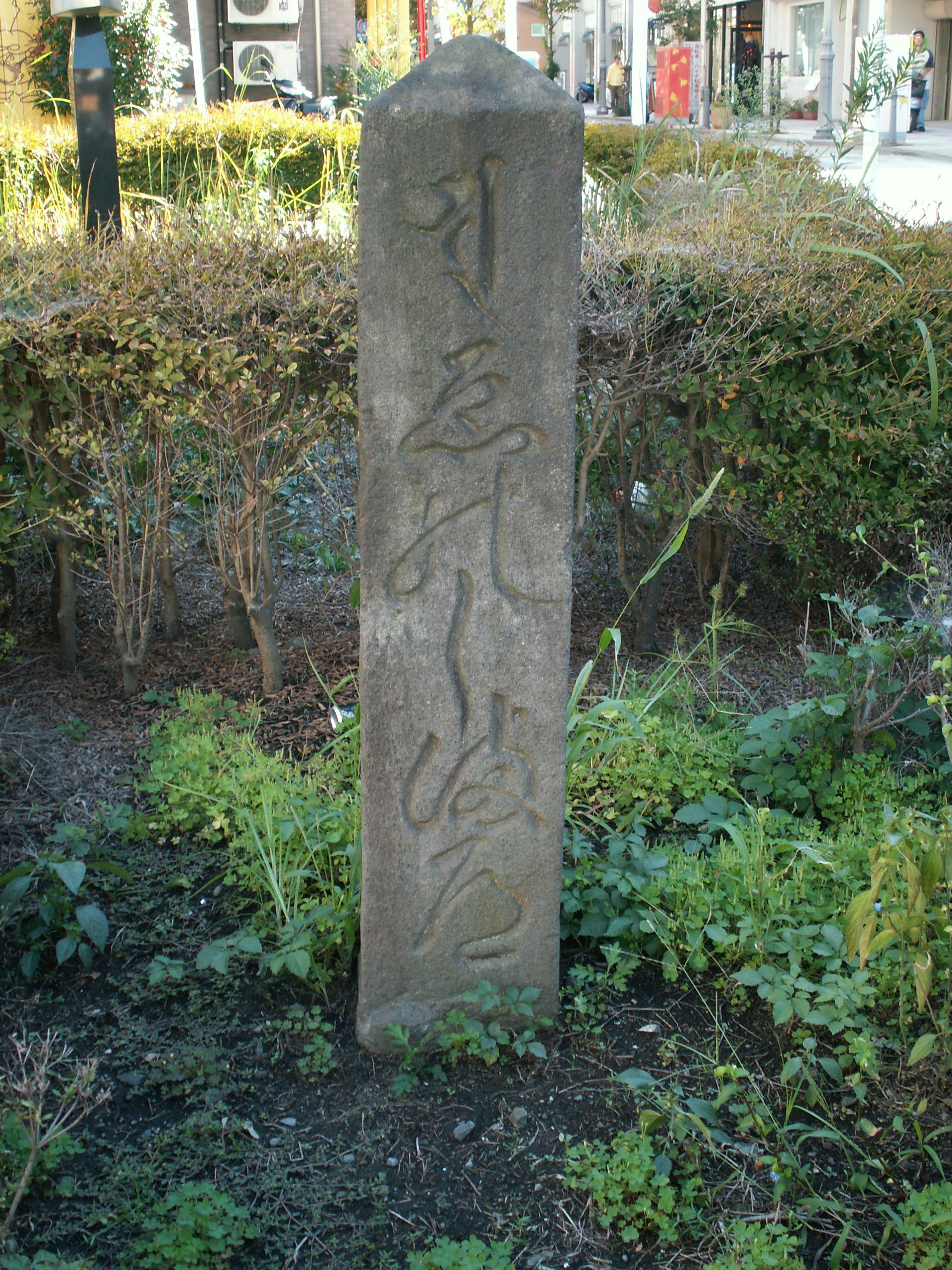 杉山和一が建てた、江の島道道標（神奈川県道306号線起点付近より撮影）